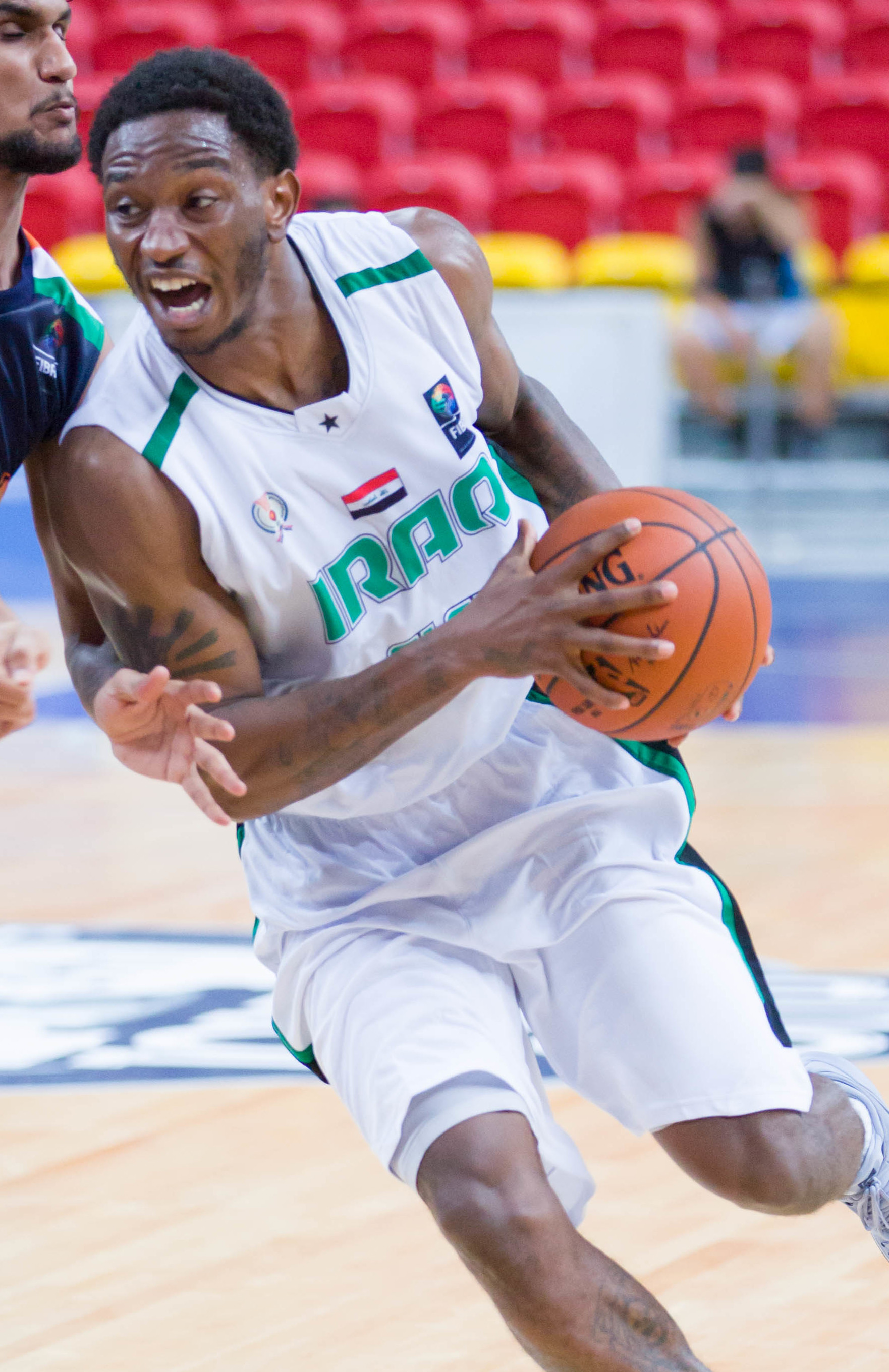 DEMARIO AQUAN MAYFIELD 3